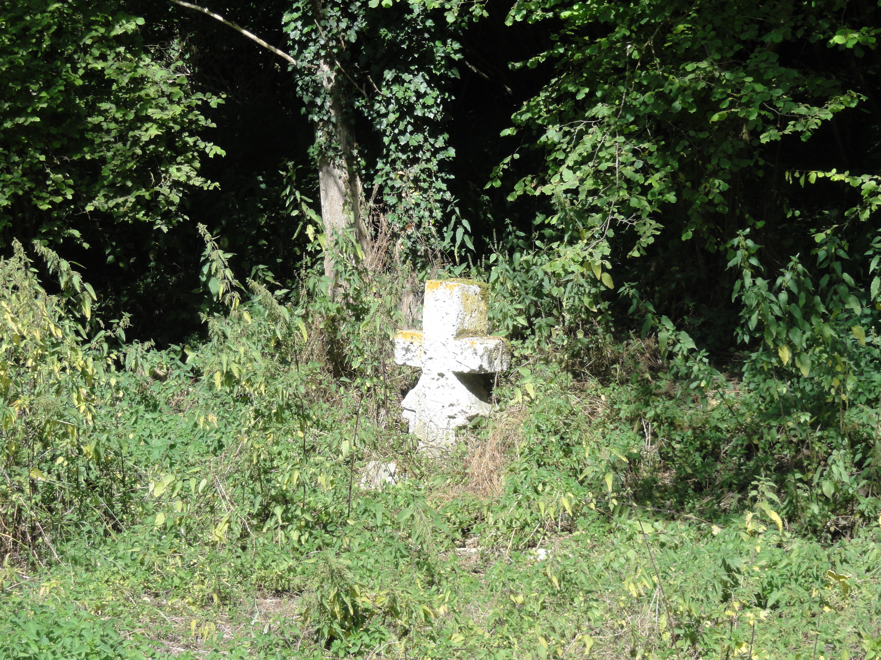 Croix pattée dite croix des Jonquets, près du CR n° 9, partant de l'ancien abreuvoir, rue de l'Abreuvoir (route de Bercagny).